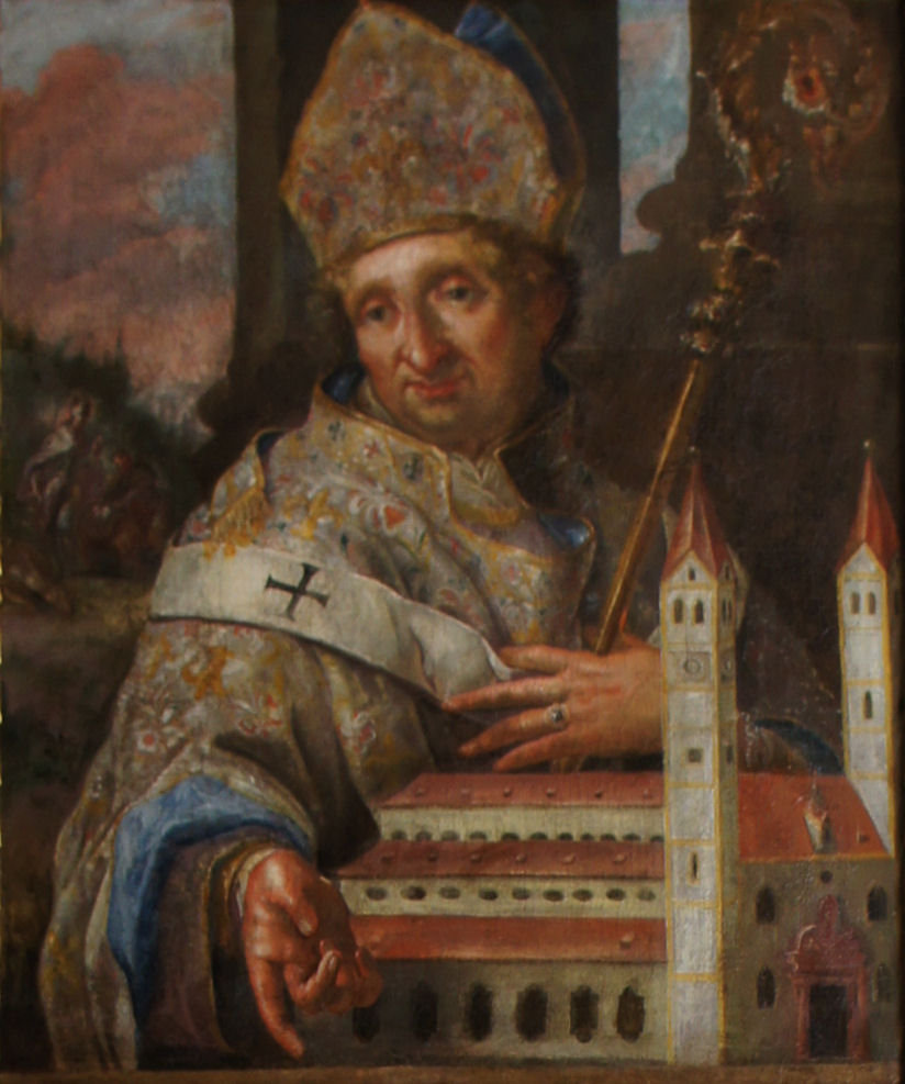 Porträtgemälde des Hl. Korbinian, Bischof von Freising, im Fürstengang zwischen Fürstbischöflicher Residenz und Freisinger Dom.